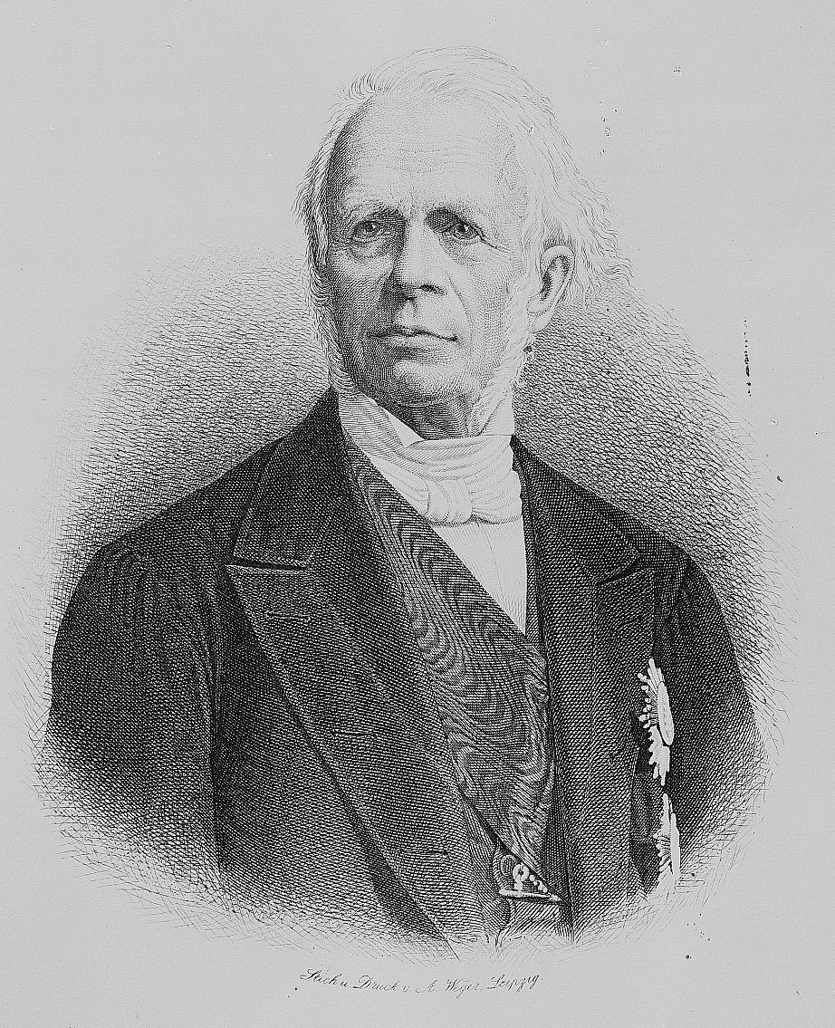 Johann Paul von Falkenstein (1801–1882), sächsischer Staatsminister